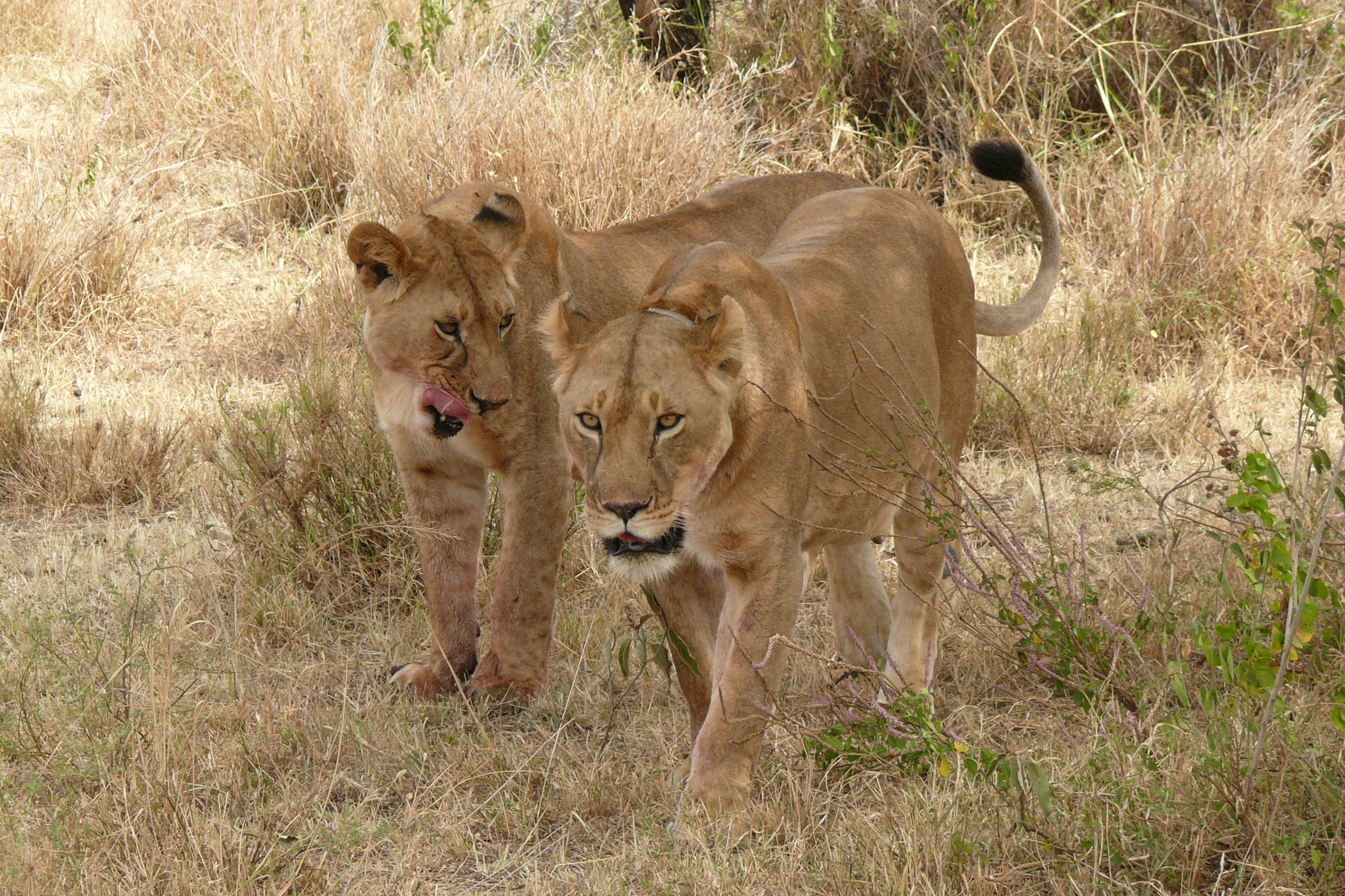 Löwen (Panthera leo)